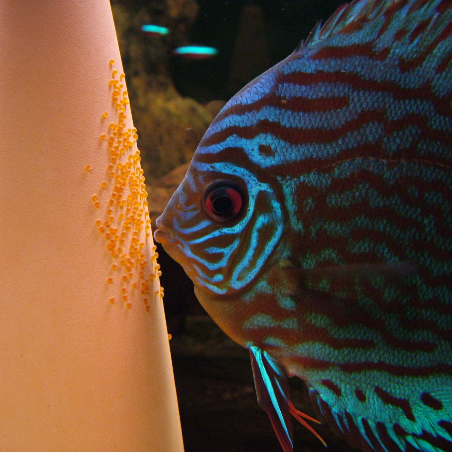 Diskusfisch (Symphysodon aequifasciatus) mit Gelege kurz nach dem Legen und Befruchten. Autor: M. Kraus - Bearbeitung (Ausschnitt, Neons zum Teil entfernt) von Waugsberg